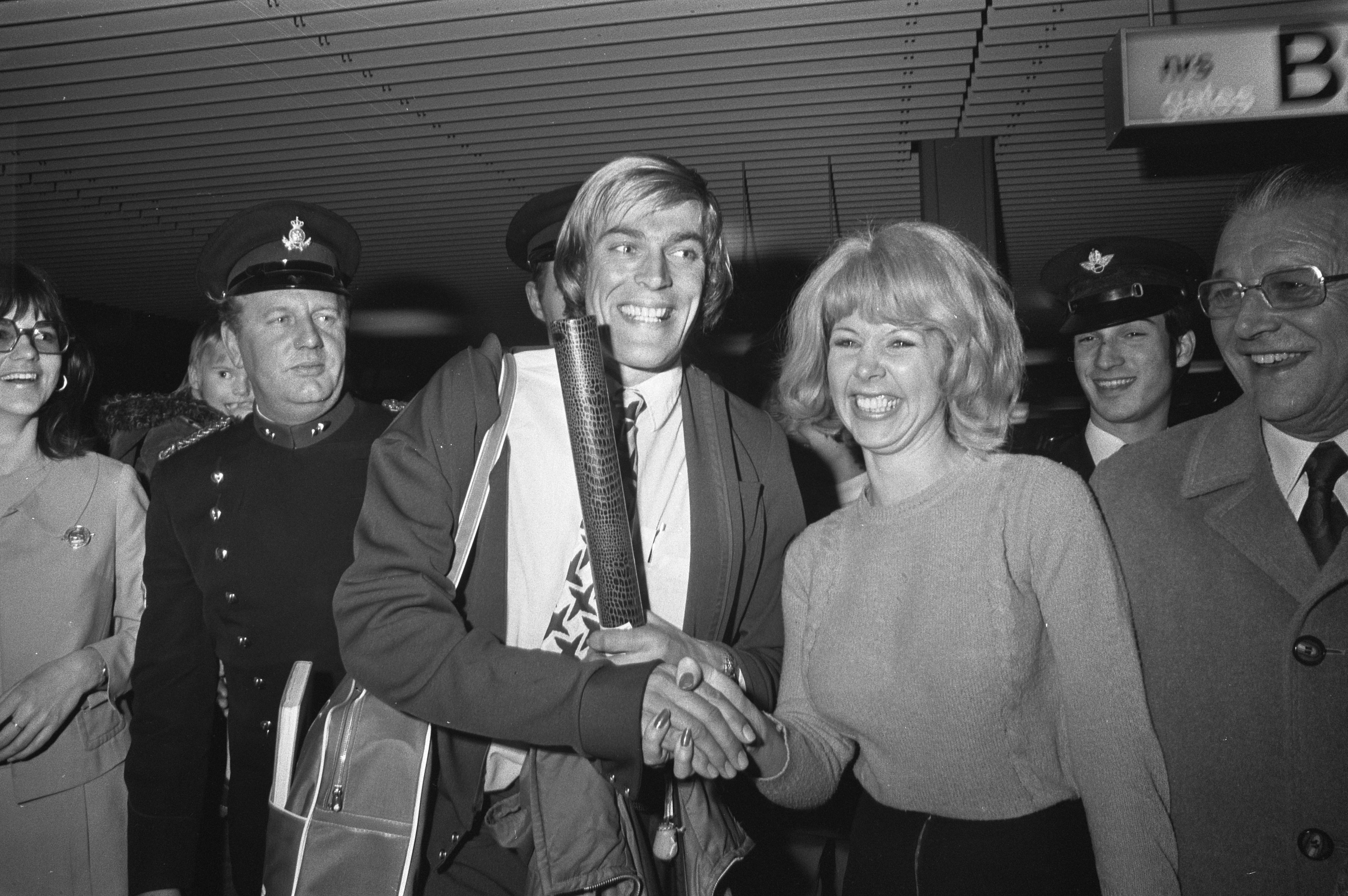 Collectie / Archief : Fotocollectie Anefo Reportage / Serie : [ onbekend ] Beschrijving : Nederlandse herenschaatsploeg terug op Schiphol van Olympische Winterspelen te Sapporo, Schenk wordt gefeliciteerd door meisje Datum : 9 februari 1972 Locatie : Noord-Holland, Schiphol Trefwoorden : schaatsers Instellingsnaam : Olympische Winterspelen Fotograaf : Mieremet, Rob / Anefo Auteursrechthebbende : Nationaal Archief Materiaalsoort : Negatief (zwart/wit) Nummer archiefinventaris : bekijk toegang 2.24.01.05 Bestanddeelnummer : 925-3743 Reacties Geplaatst door Sportliefhebber op 14 november 2017 - 15:24. Persoonsnaam: Schenk, Ard